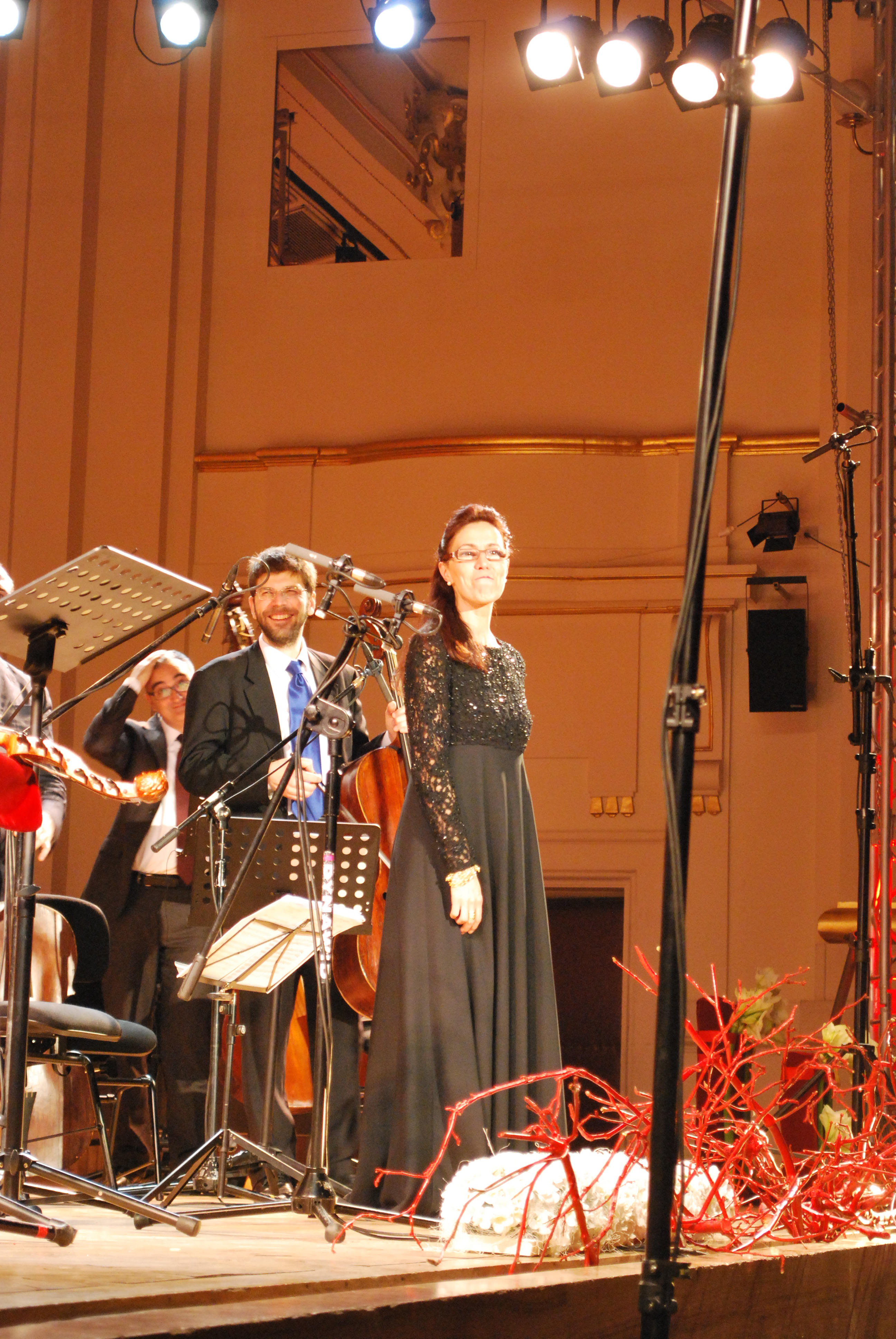 [:pl:Sara Mingardo] podczas koncertu w Filharmonii Krakowskiej w ramach festiwalu Misteria Paschalia, 10 kwietnia 2009.